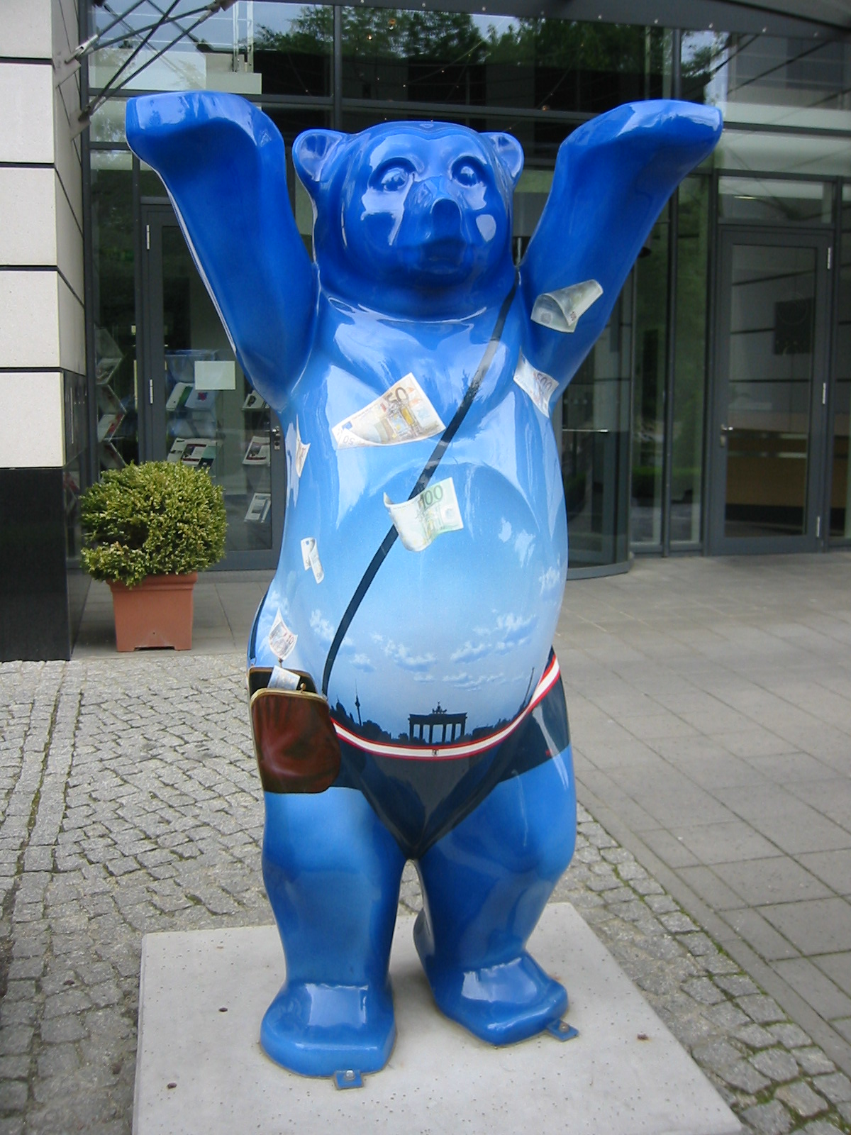 Buddy Bear: Sterntaler Standort/Location: Lennéstr. 11, Berlin-Tiergarten